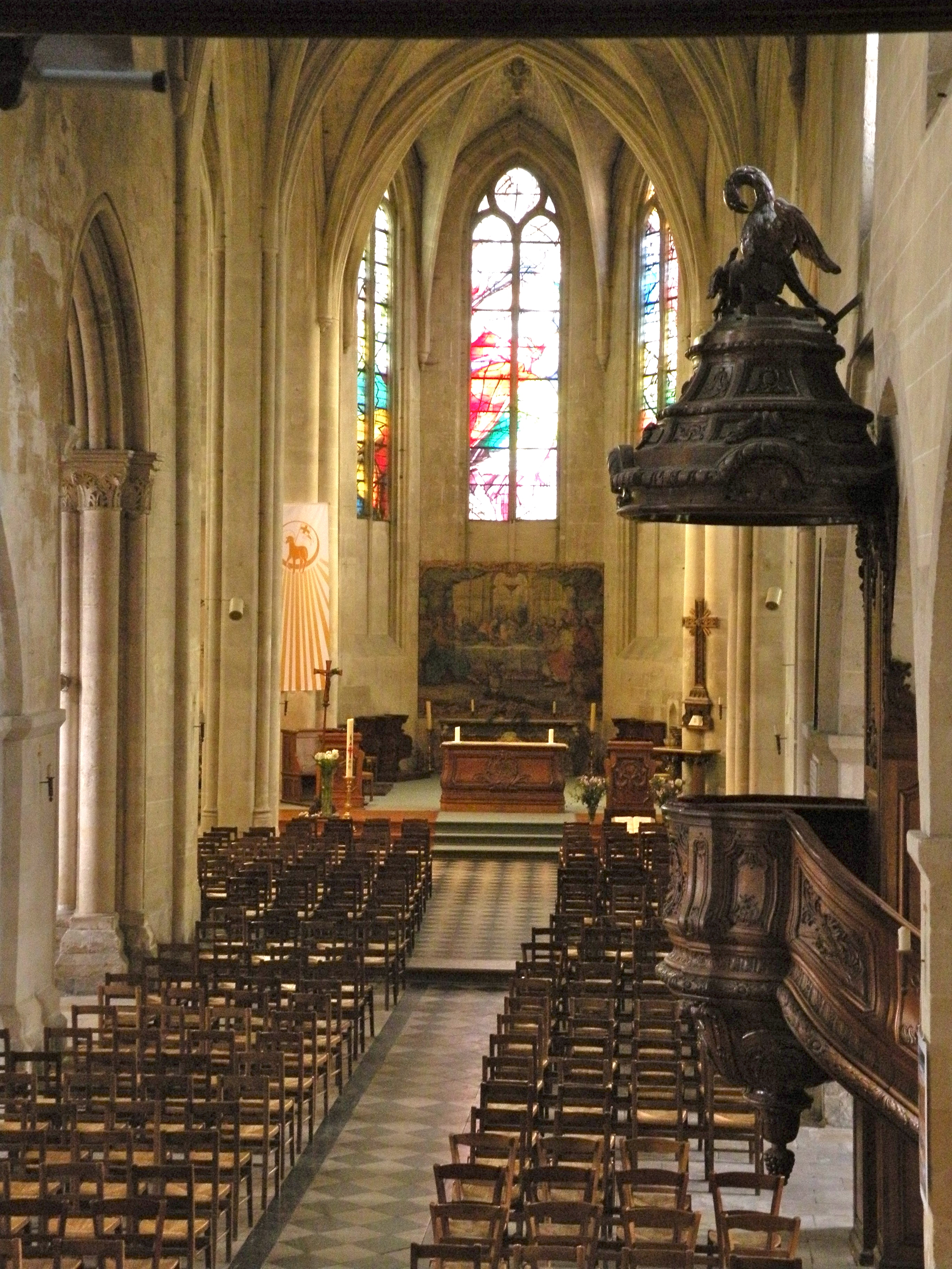 vaisseau et coeur Église Saint-Denis, Crépy-en-Valois